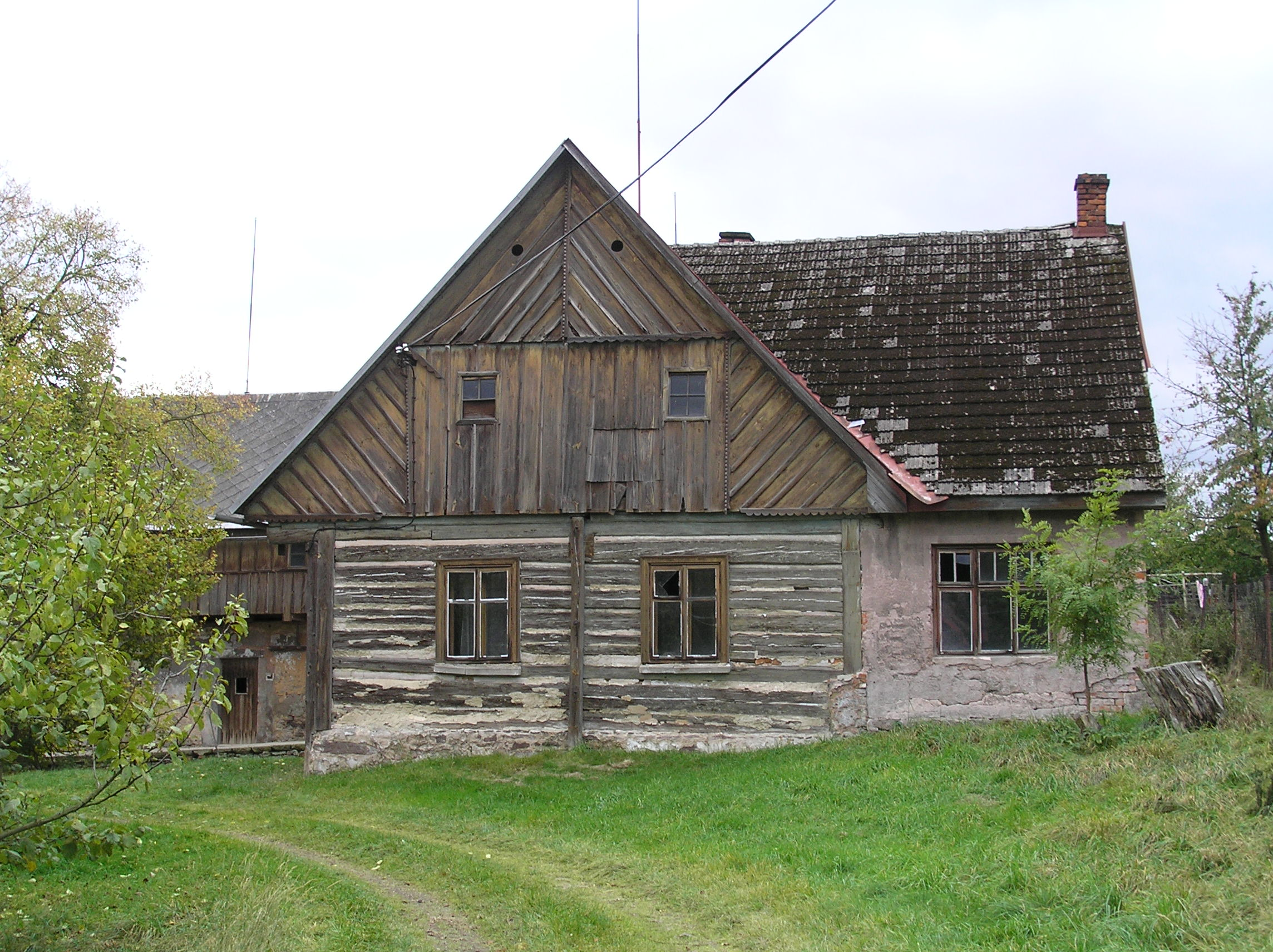 Bohdánkov - lidová architektura čp. 7